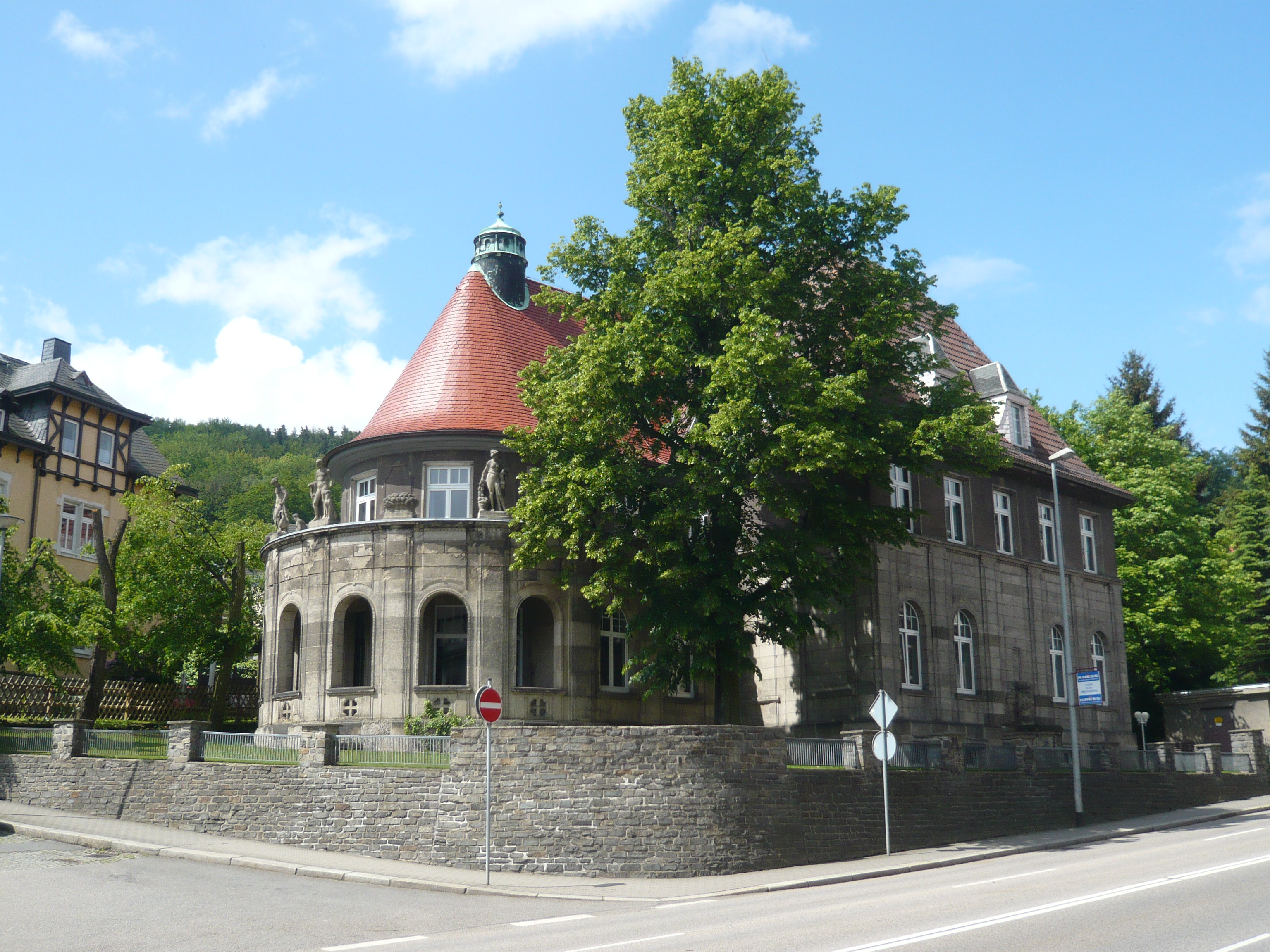 Stadt Aue, früheres Wohnhaus des Fabrikanten P. P. Gaedt